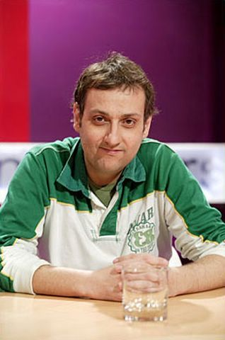 Albert Espinosa en el programa Versión Española.